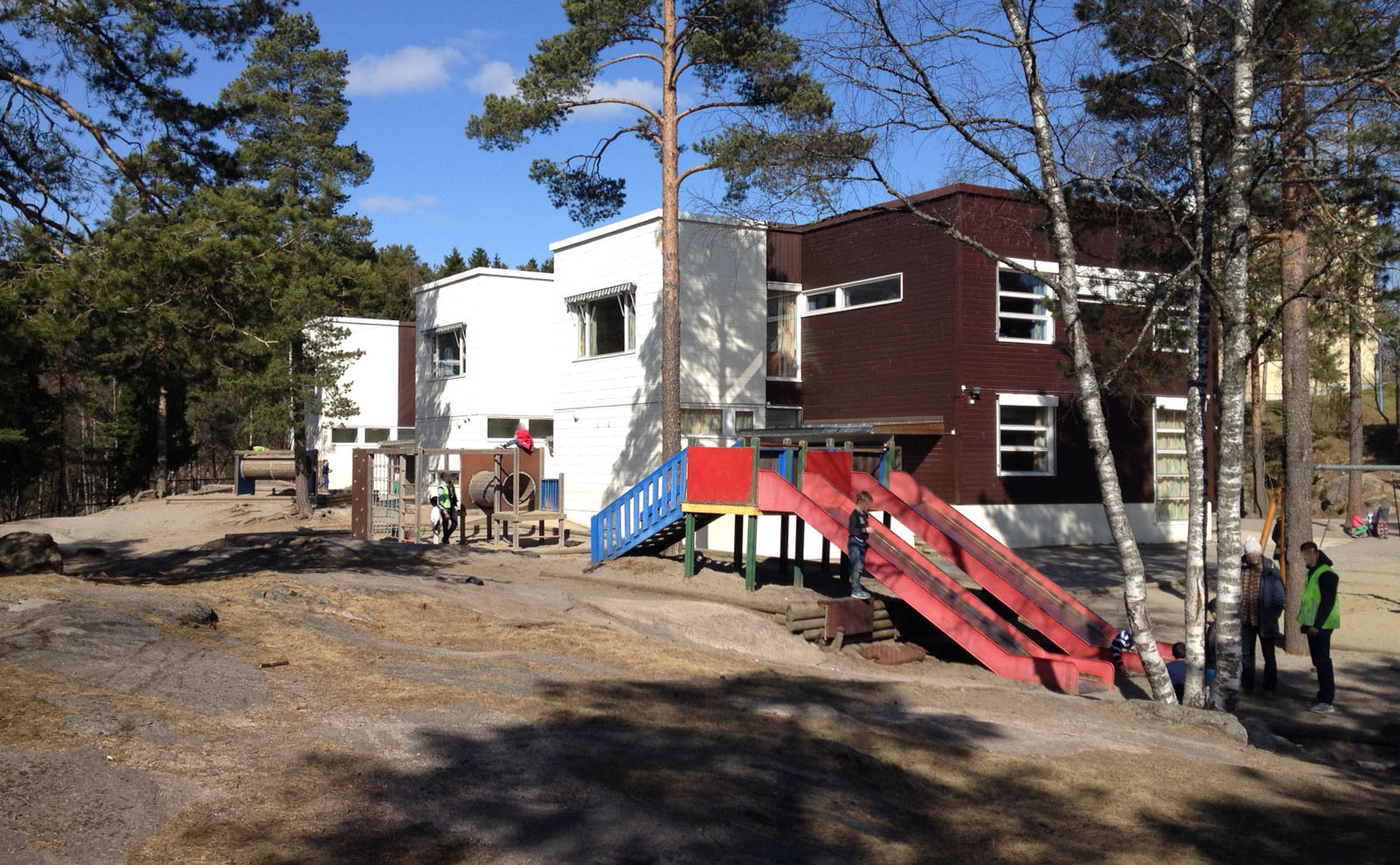 Svarttjern skole i Oslo